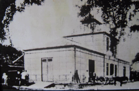 Estação Bananal - (SP)-Brazil